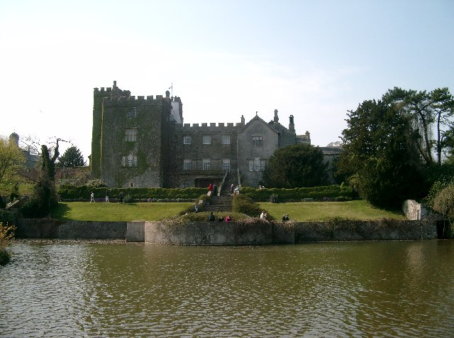 Sizergh Castle